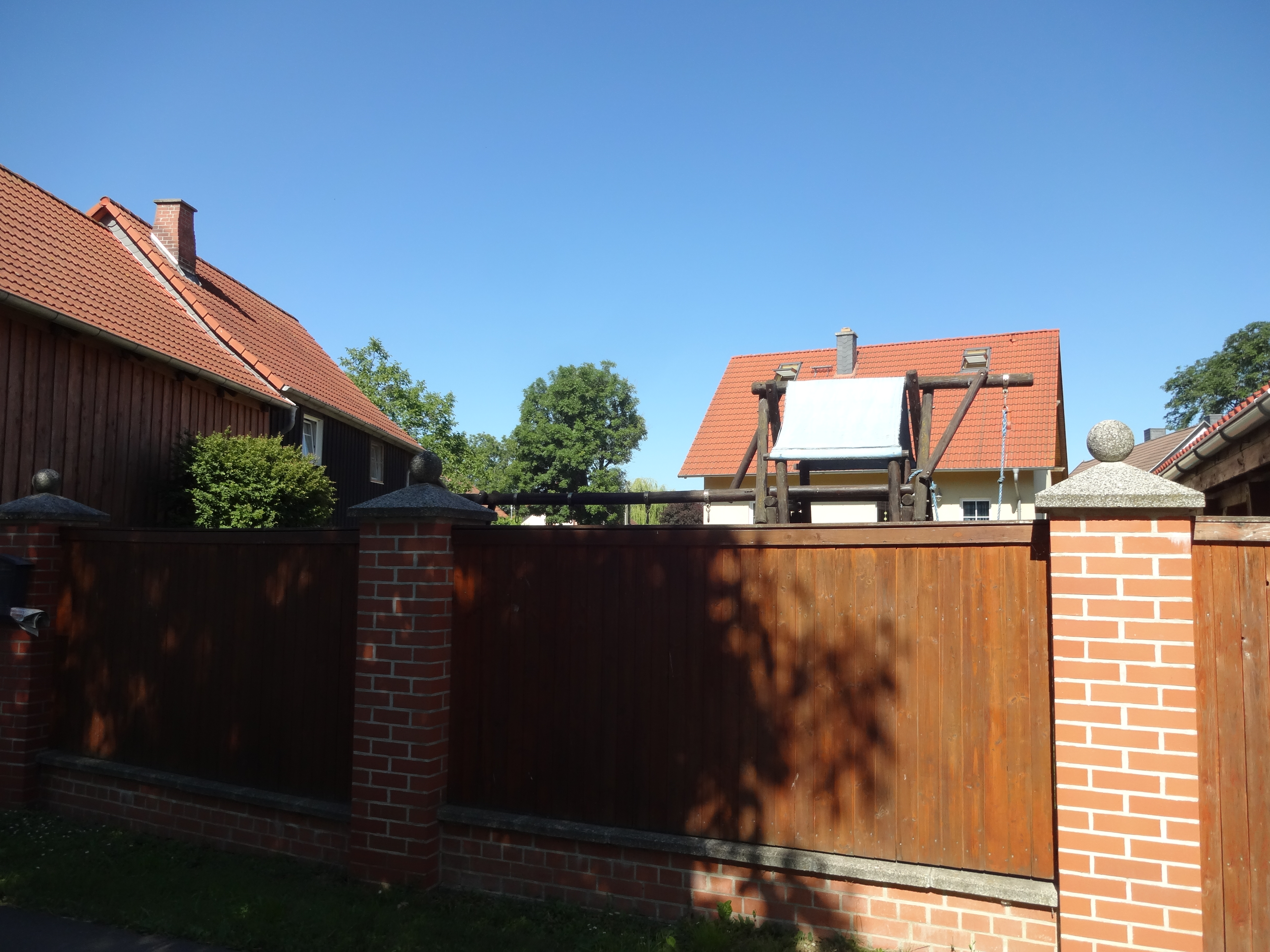 ehemals denkmalgeschütztes Bauernhaus in der Schmiedestraße 7 in Langeln, Gemeinde Nordharz